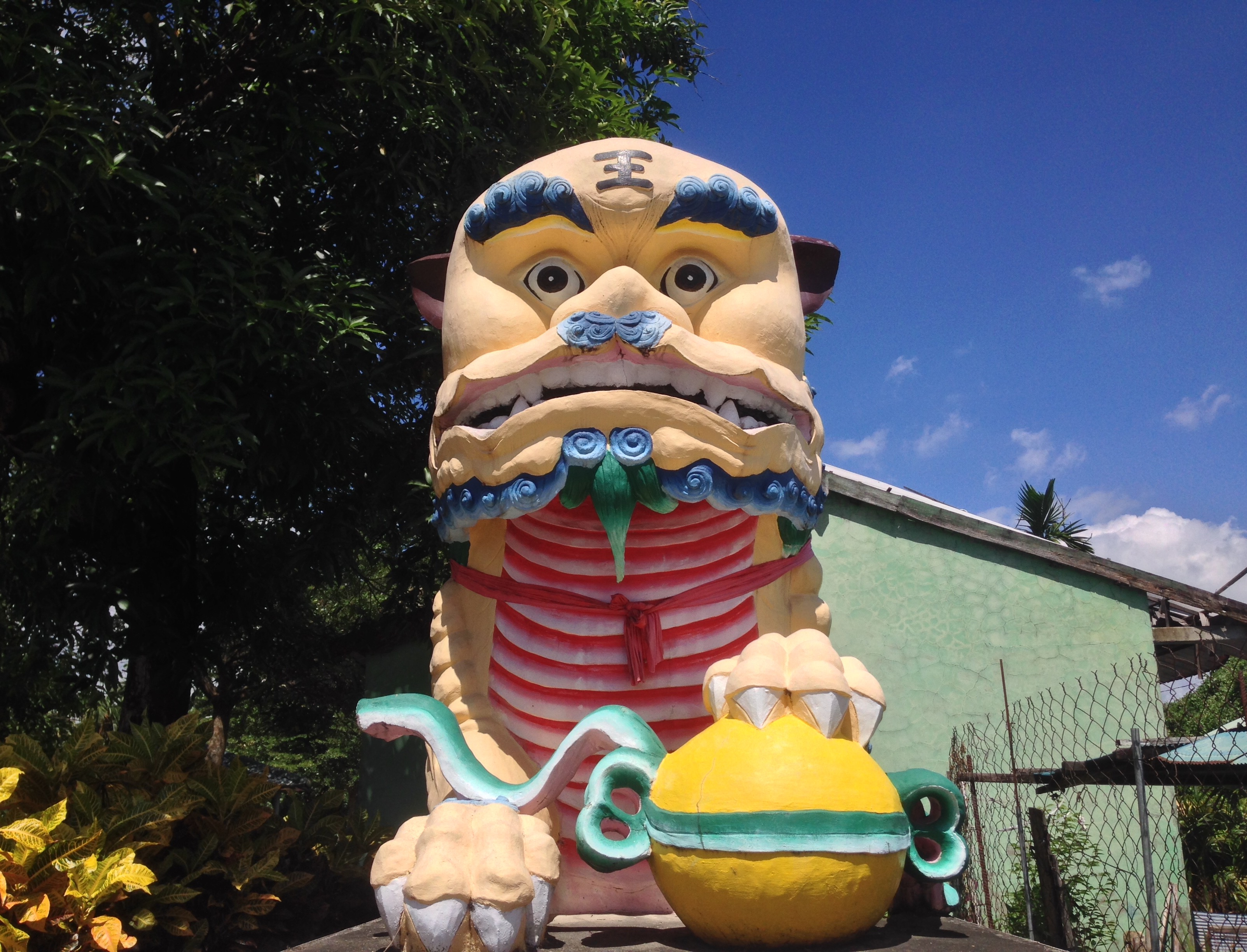 中文（台灣）: 獅老三正面